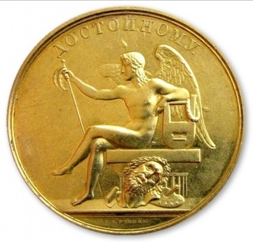 Золотая медаль Императорской Академии художеств